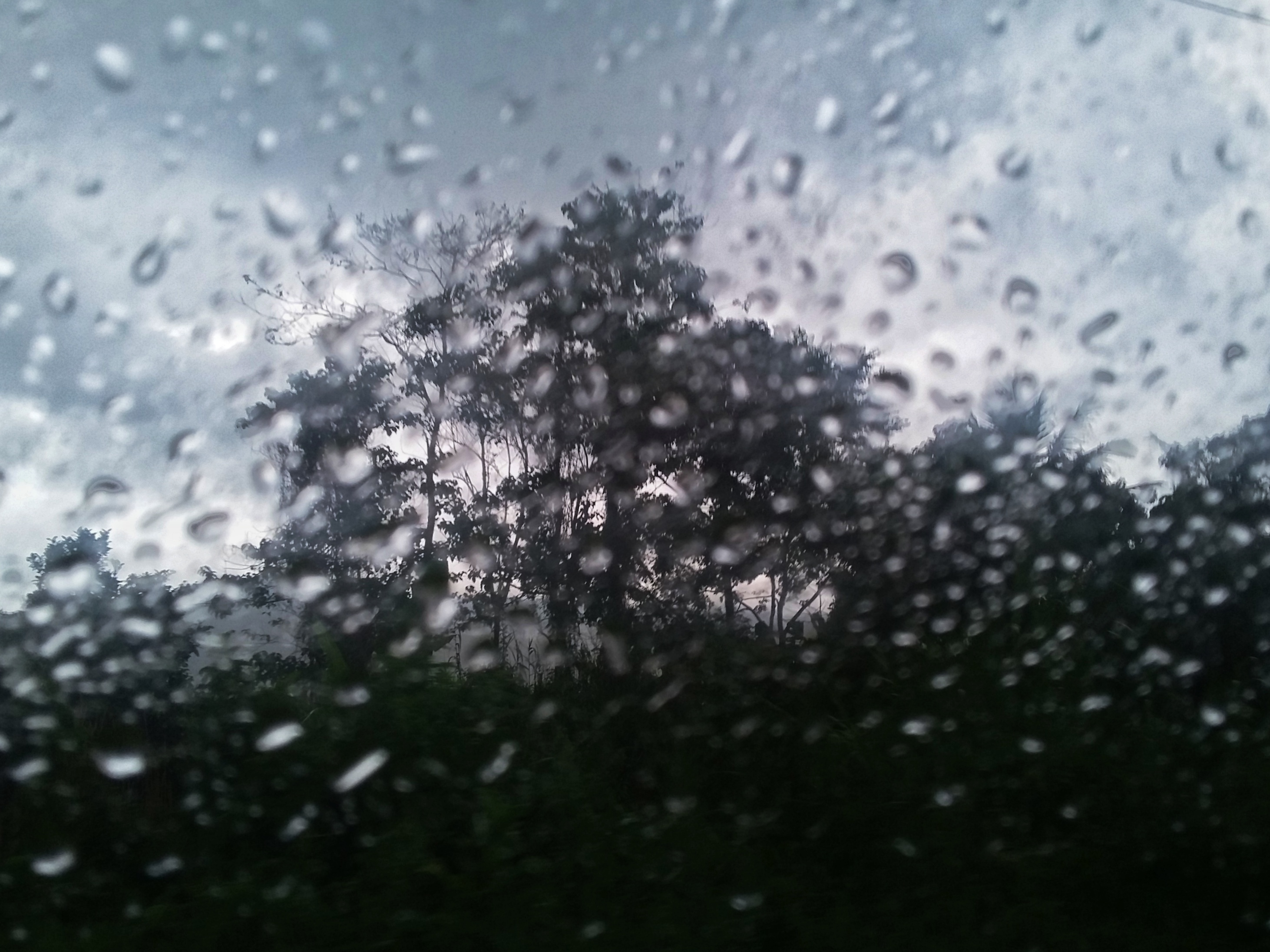 Foto ini diambil di Tapanuli saat hujan berlangsung, dengan pohon dan rintik air sebagai objek.